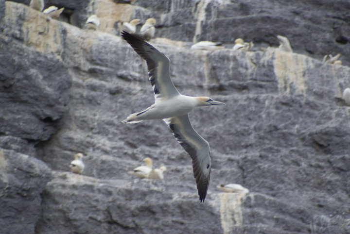 Morus bassanus w kolonii lęgowej na wyspie Little Skellig w Irlandii